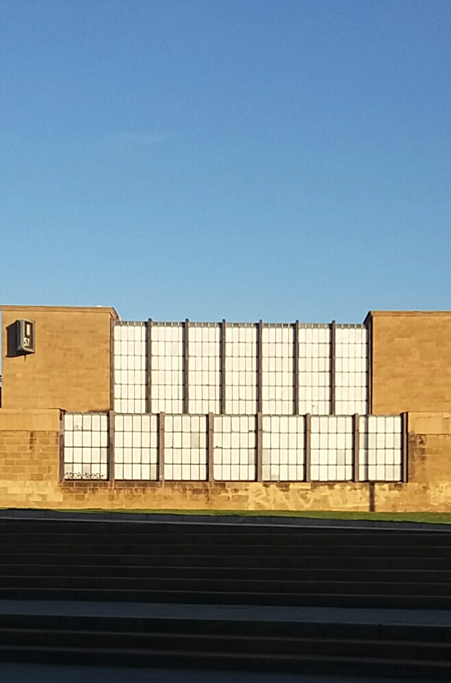 le vetrate che ricordano una cascata